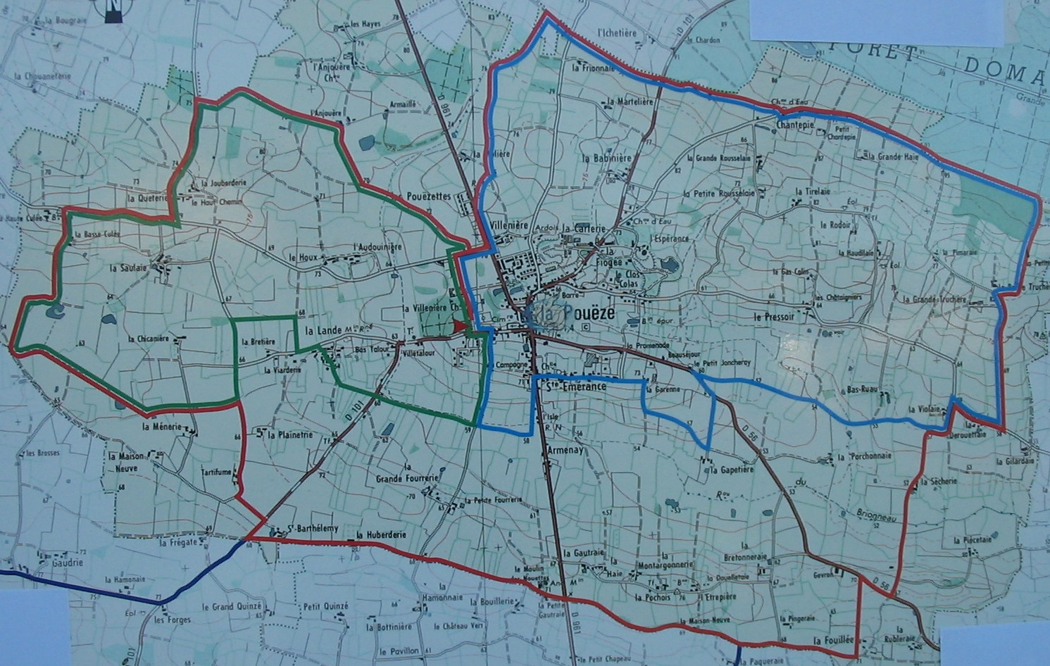 panneau des circuits de randonnée de la Pouëze